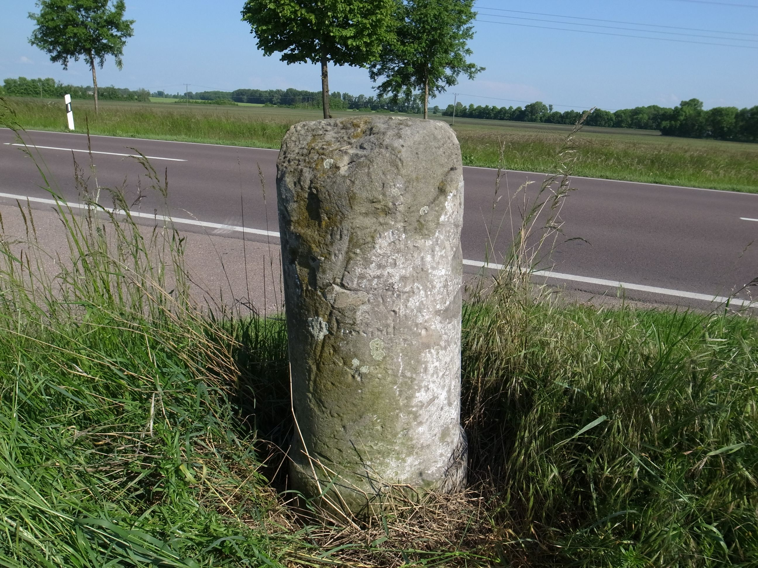 Meilenstein zwischen Köthen und Porst. Der Stein ist stark beschädigt die Schrift ist nur noch teilweise lesbar. Auf der Straßenseite ist erkennbar "I Meilen von" auf der Seite am Feldweg "Dessau"